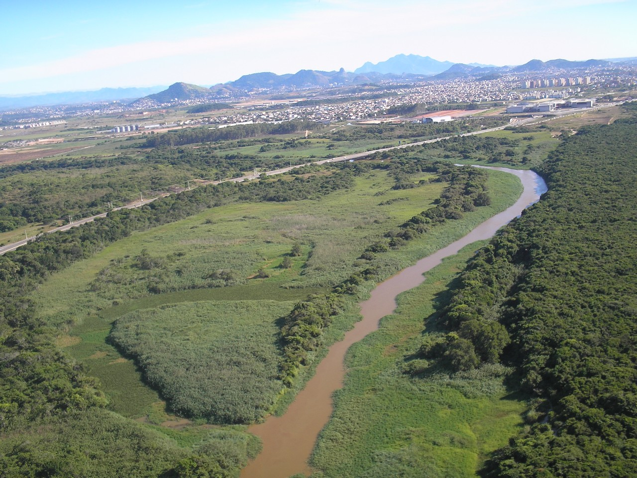 Barra do Jucu - Vila Velha E.S